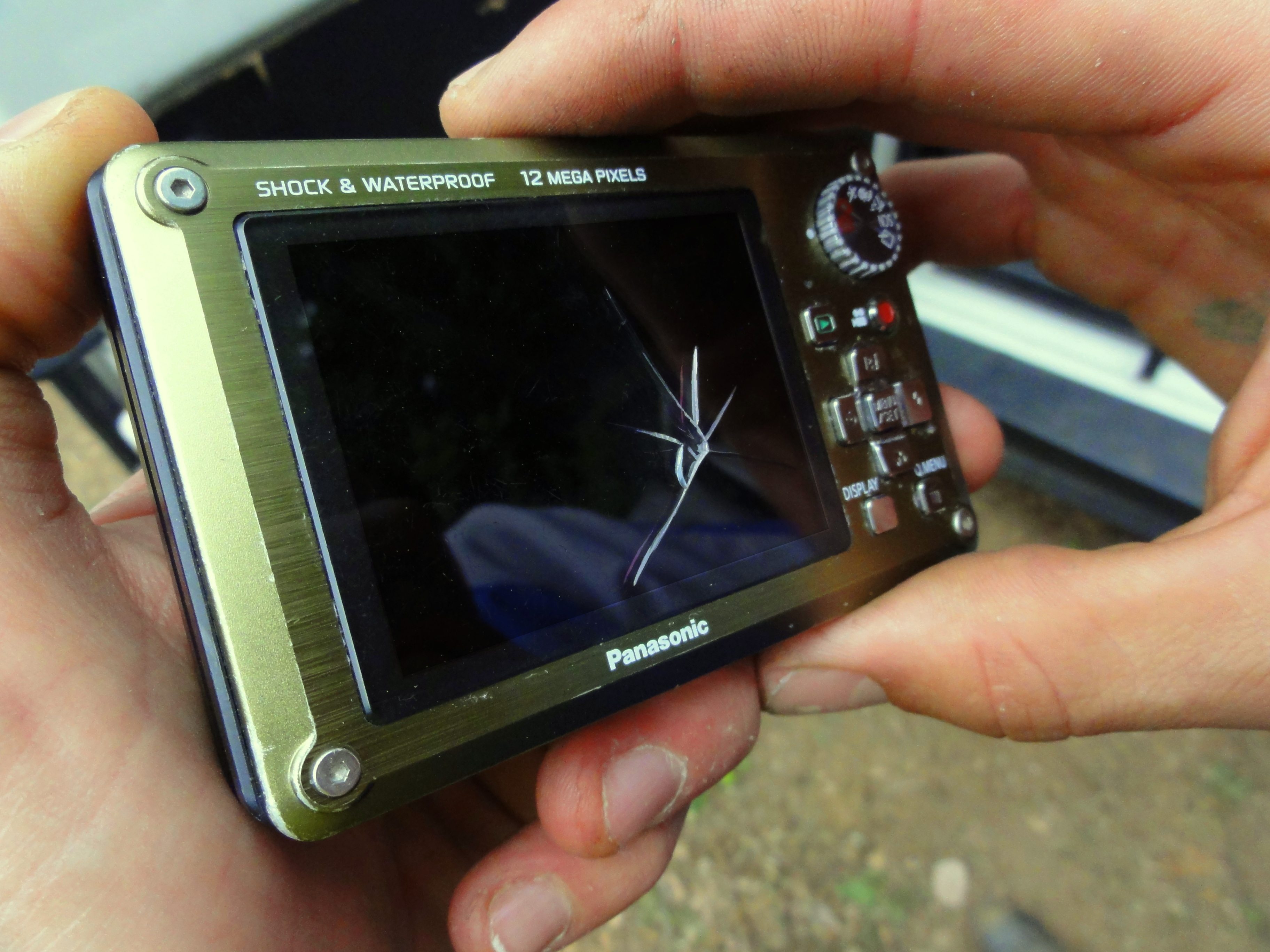 Ecran brisé d'une Lumix FT1.